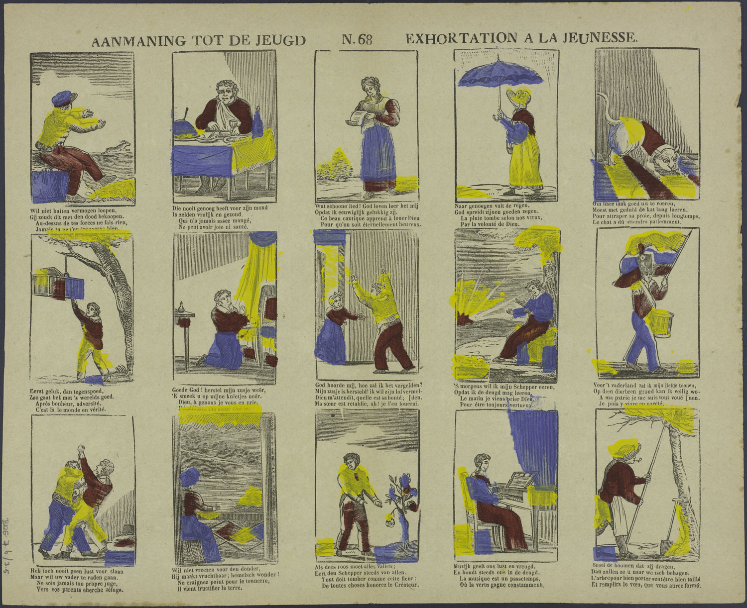 Oblong centsprent met 3 x 5 omkaderde houtsneden met afbeeldingen en moraliserende teksten van een haas in het veld, een man die teveel eet, een meisje met christelijke liedjes, regen op een paraplu, een kat vangt een rat, vogels vangen, bidden, blijdschap bij een herstelde zieke, de les leren, liefde voor het vaderland (trommelaar met vlag), vechten, onweer, eerbied voor de Schepper, muziek maken en bomen snoeien. Met christelijke elementen en tweeregelige rijmende onderschriften in Nederlands en Frans.